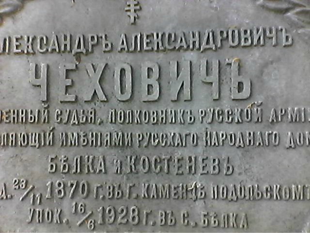 Фото таблички з надгробного хреста. Фото зроблене в селі Білка на старому цвинтарі. Сам надгробний хрест не зберігся.